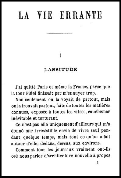 Primera página de la obra Vie Errante de Guy de Maupassant